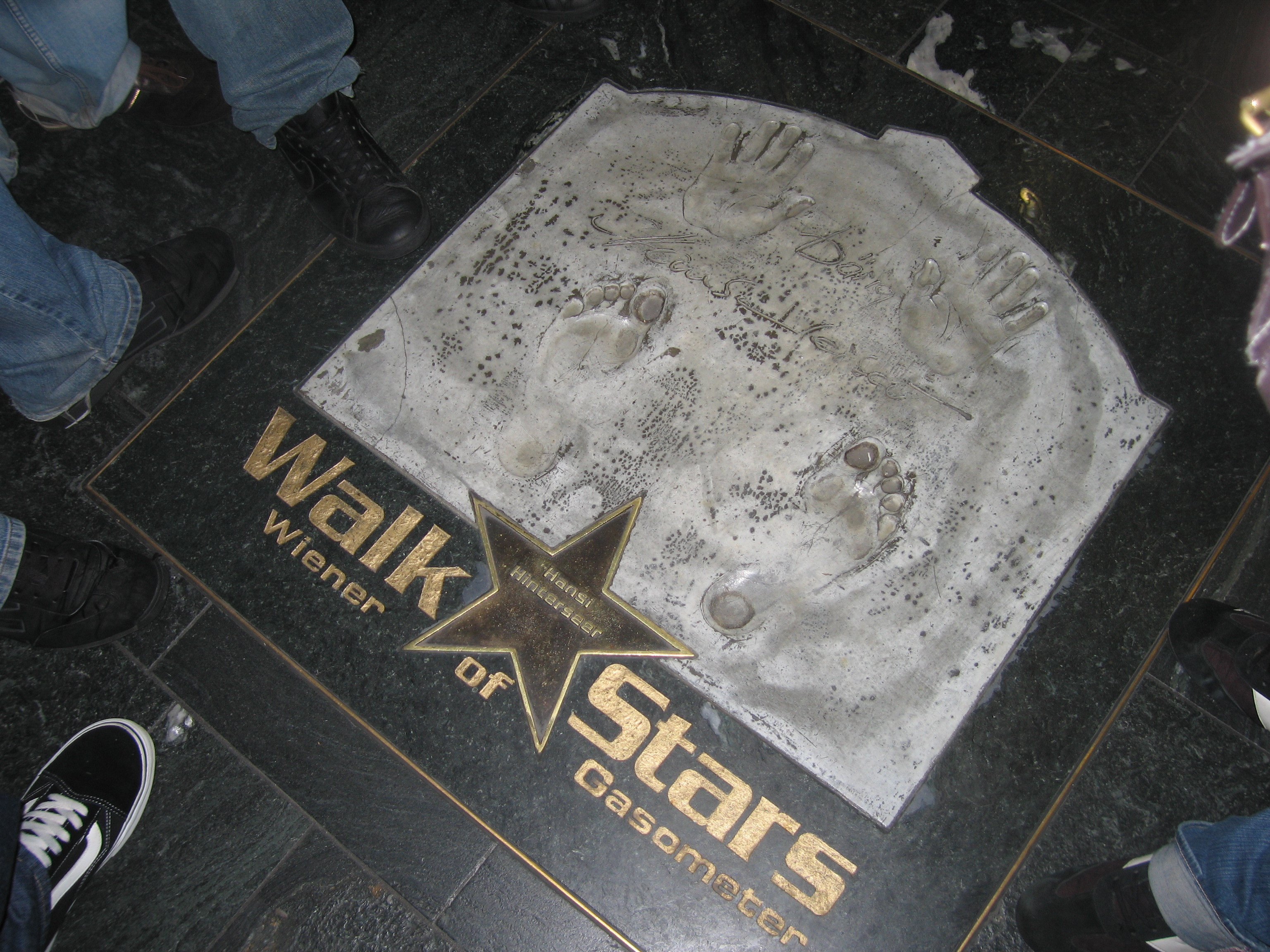 Fuß- und Händeabdruck von Hansi Hinterseer für das Walk of Stars im Wiener Gasometer